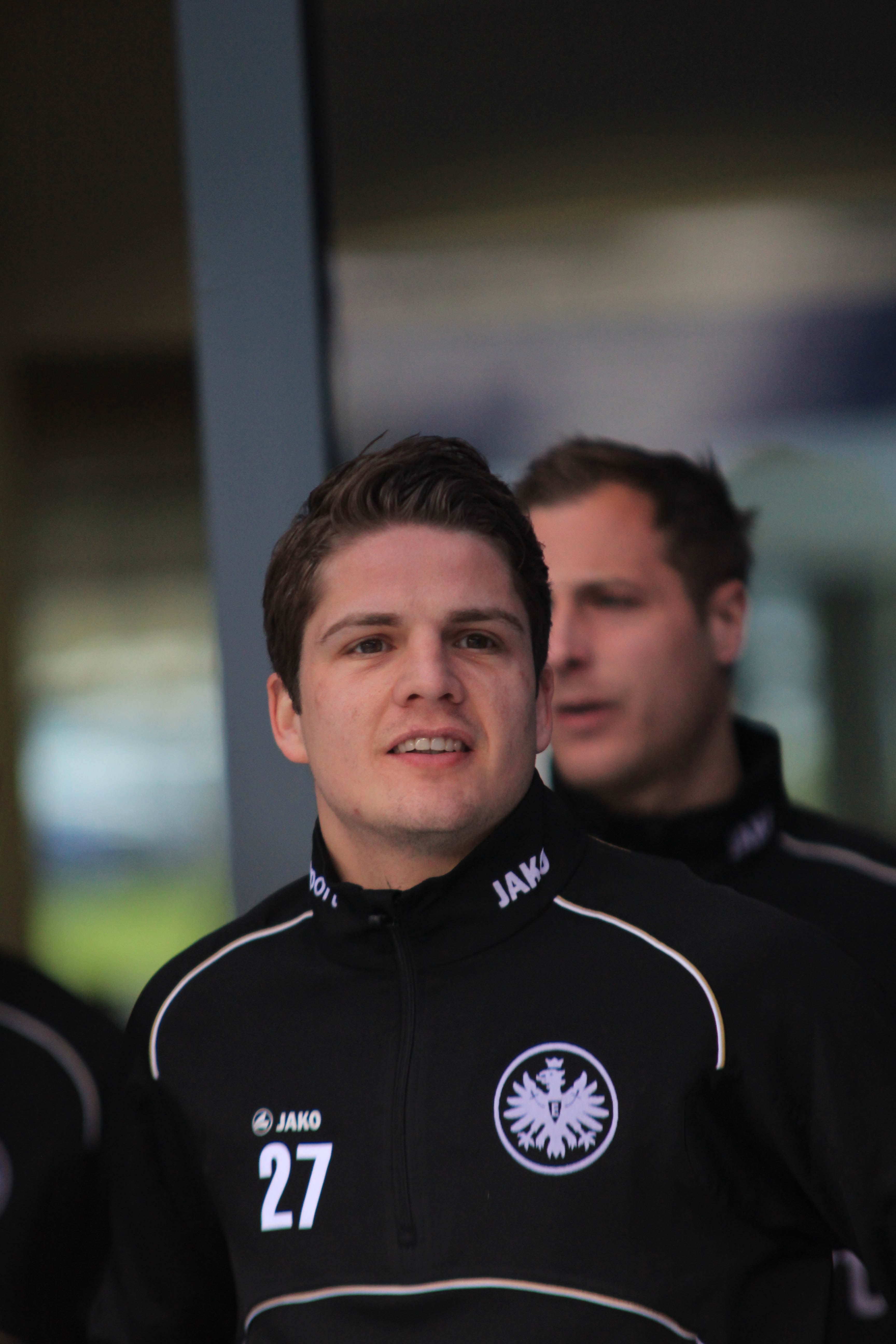 Swiss footballer Pirmin Schwegler, Eintracht Frankfurt